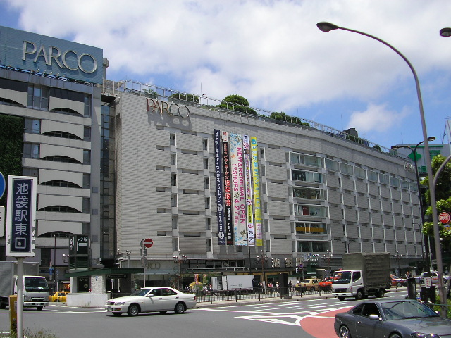 JR池袋駅・PARCO池袋店。西武百貨店に隣接する